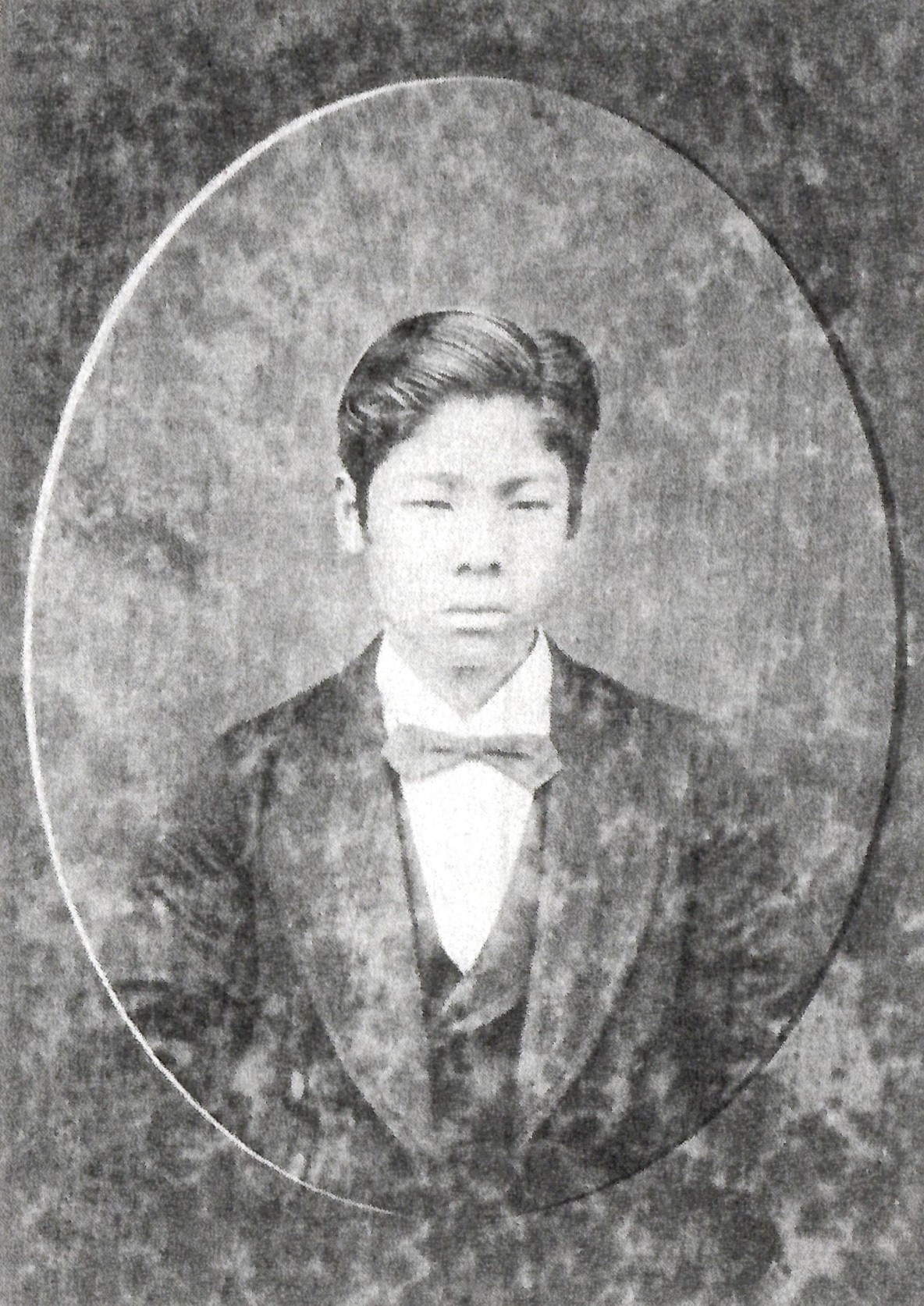 清閑寺経房の肖像写真。